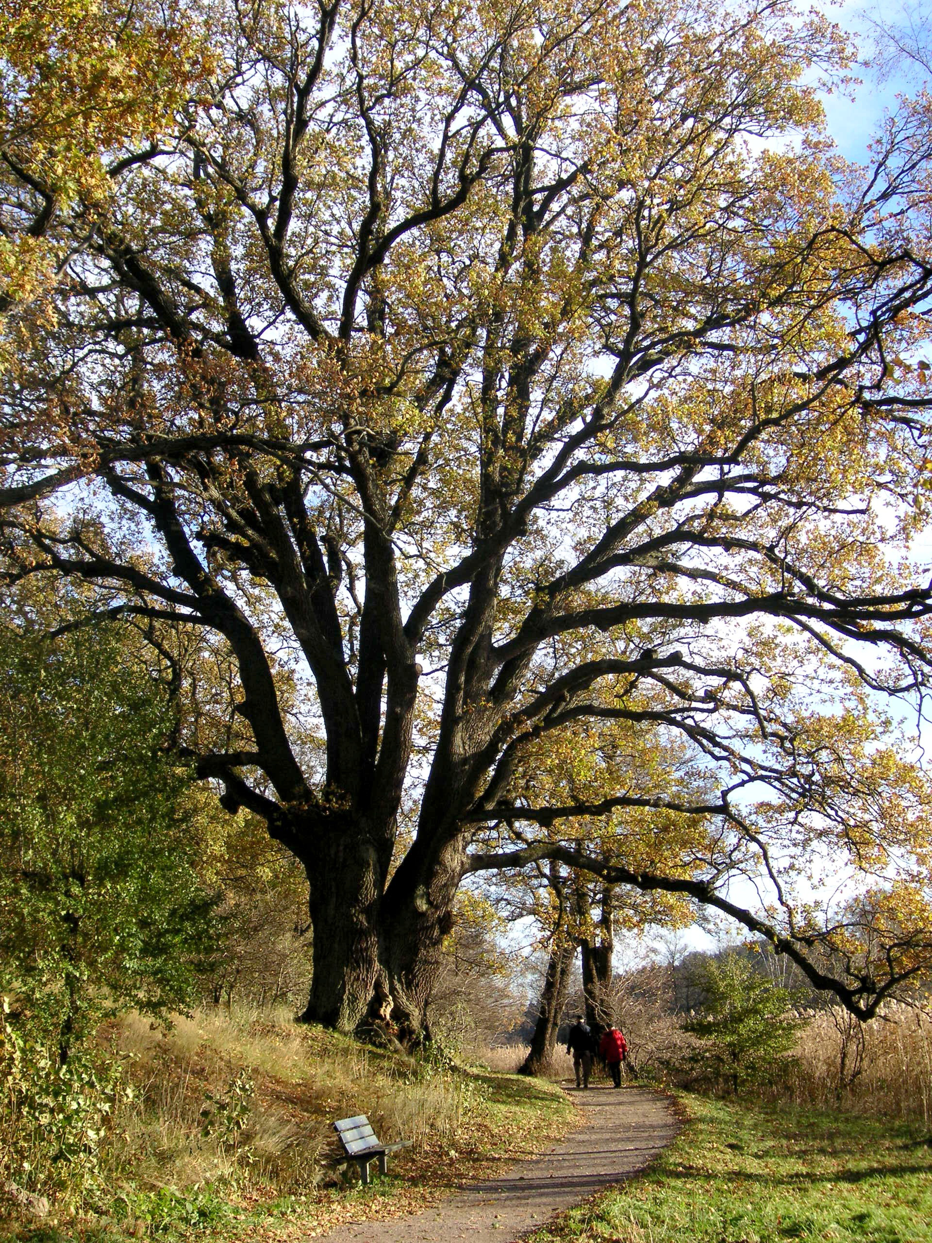 Strandpromenaden vid Kyrkviken, Lidingö, med den naturminnesmärkta eken